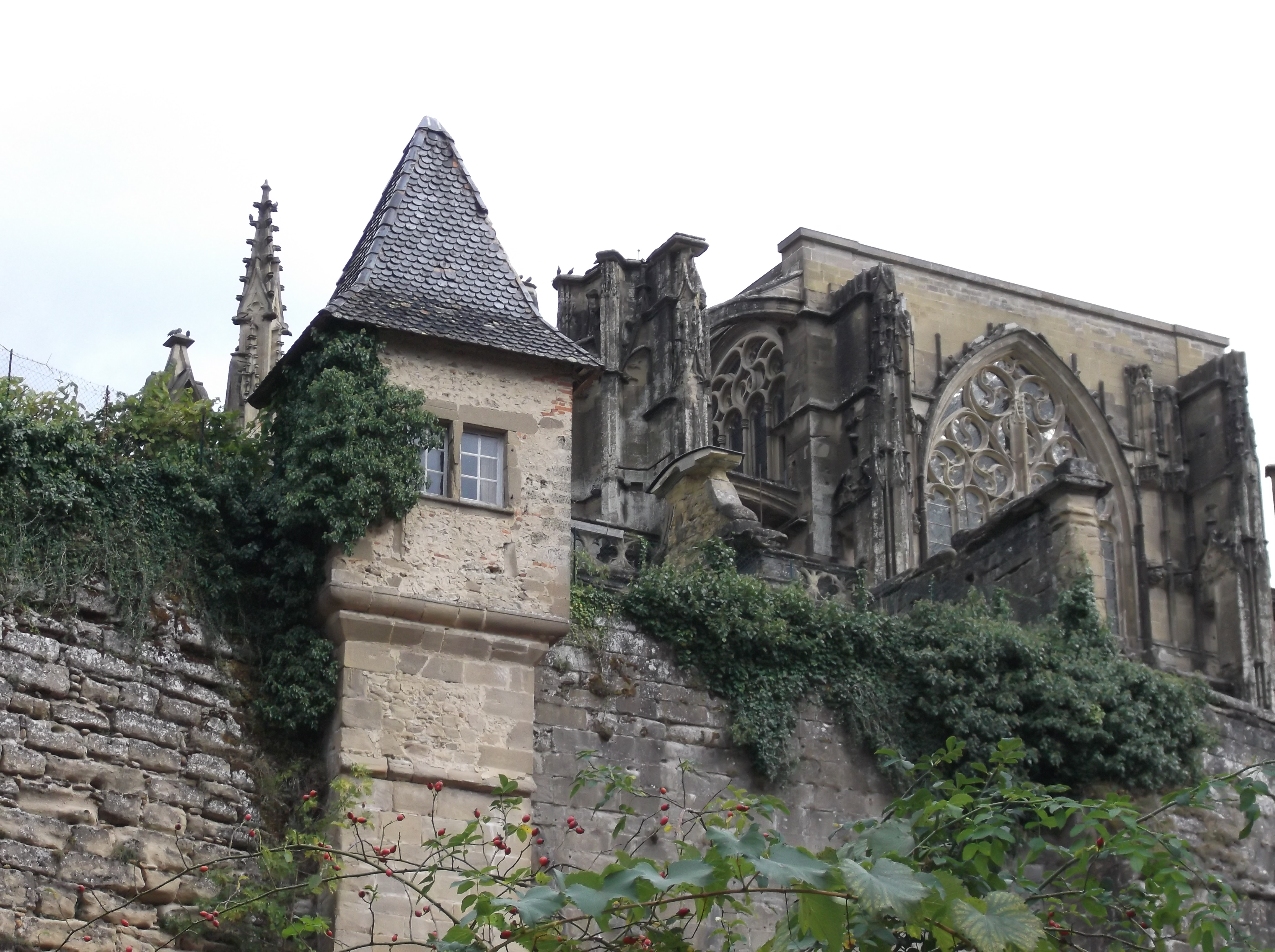 Église Notre-Dame de la Jayère _Eglise Saint-Antoine-l'Abbaye 38160 PA38000020 VAN DEN HENDE ALAIN CC -BY-SA 4 0 02022 .